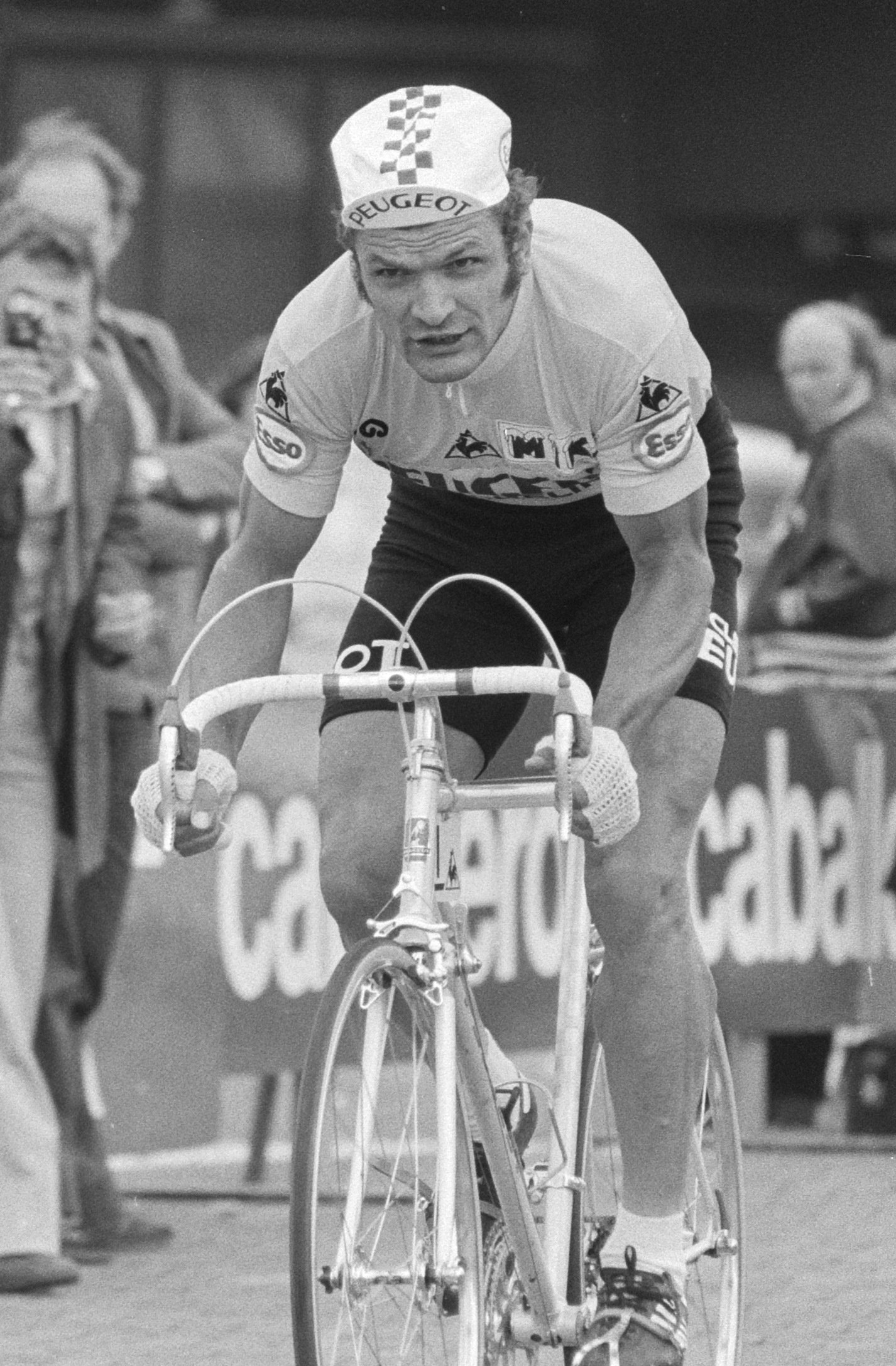 Tour de France 1978, proloog in Leiden; Thevenet (Frans) in actie.